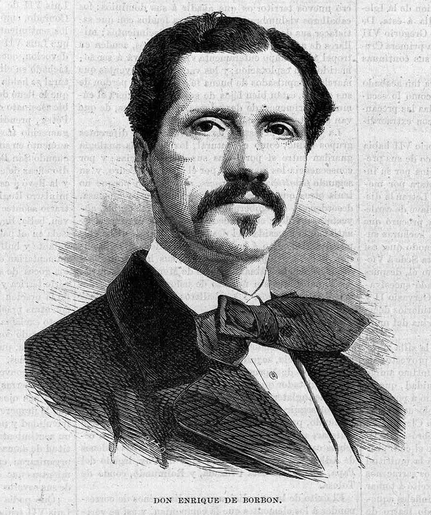 Enrique de Borbón, en la revista La Ilustración de Madrid.